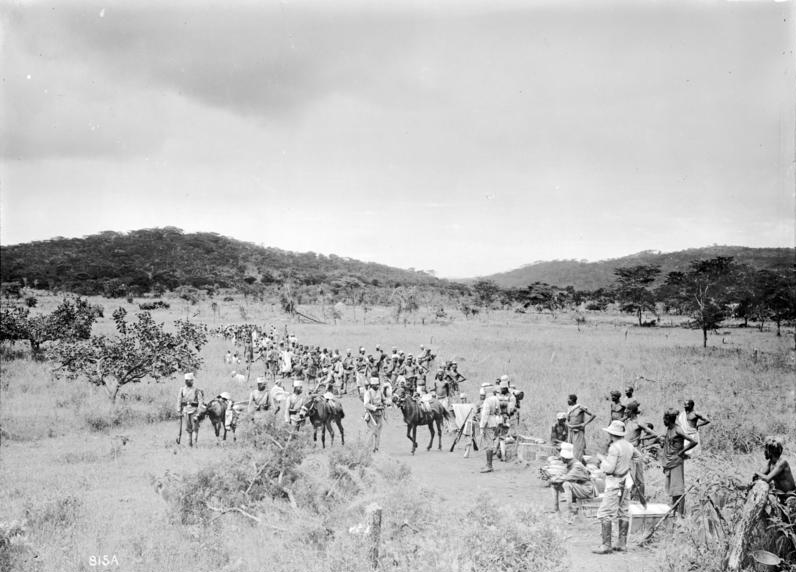 Schutztruppe , Rast des Trosses auf dem Marsch